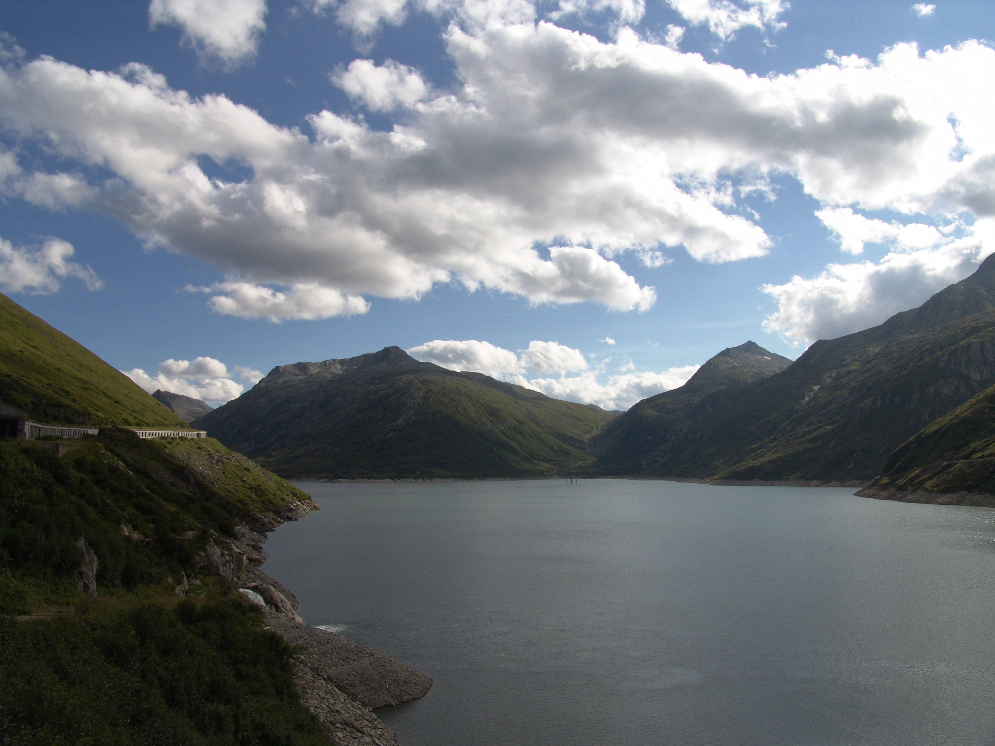 Lukmanierpass